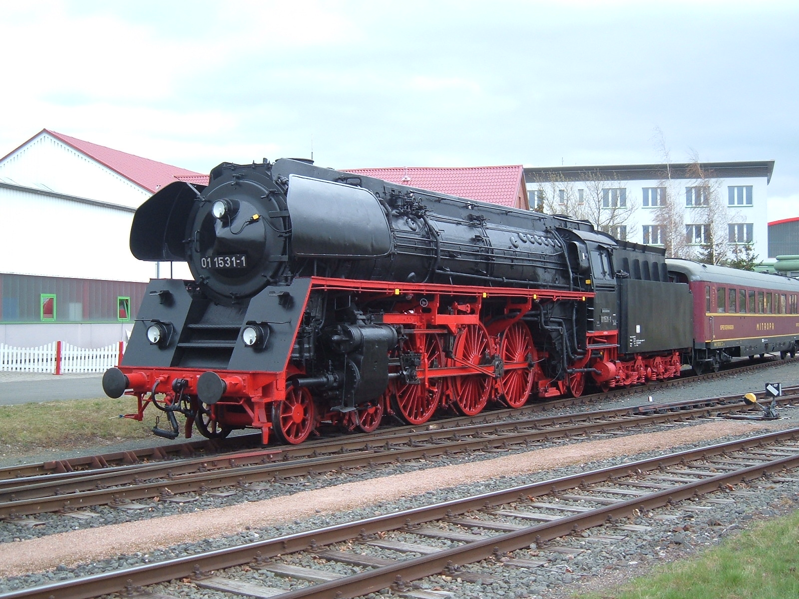 01 531 zu Besuch bem 100. Geburtstag der Erfurter Bahn.